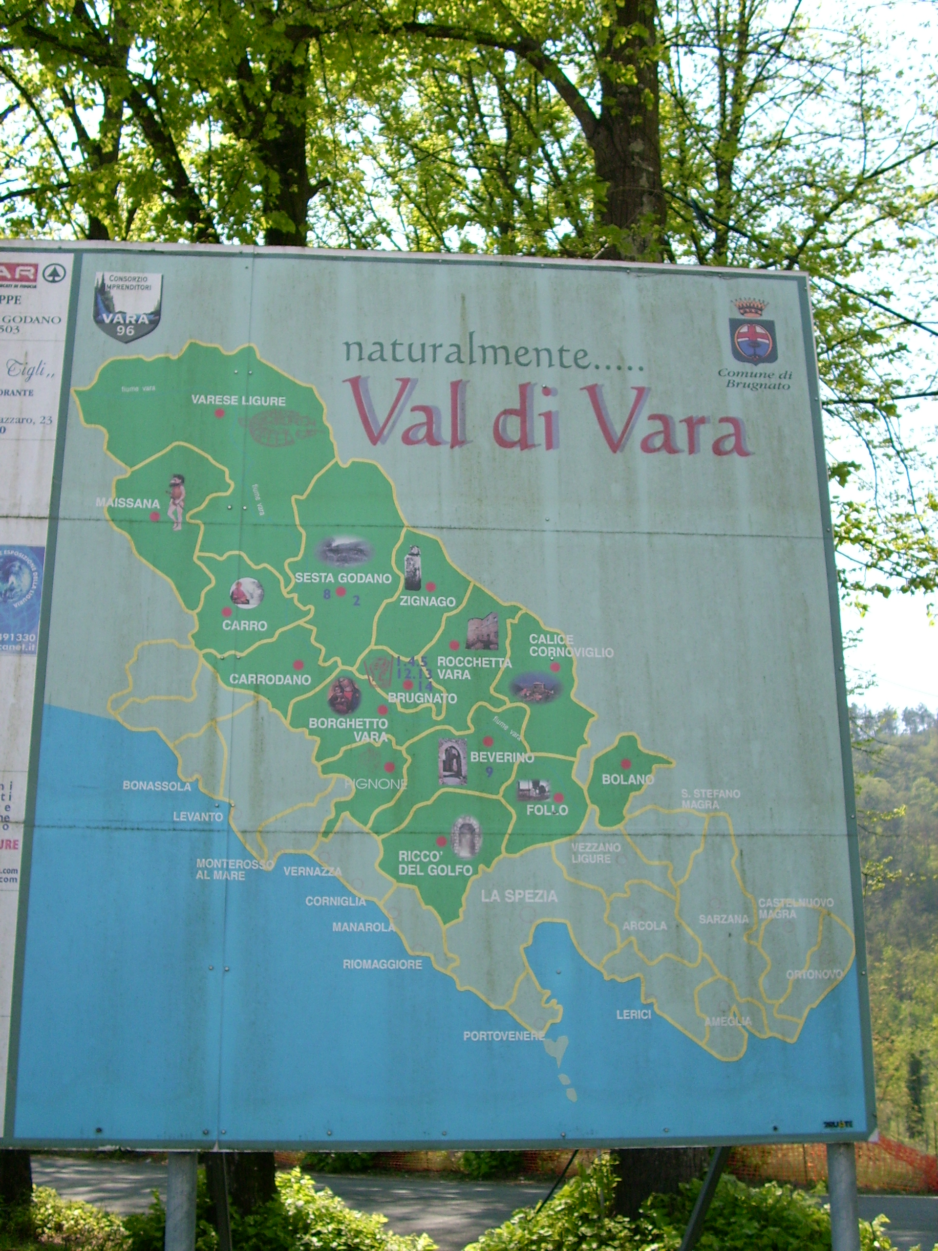 Mappa della Val di Vara, Liguria, Italia